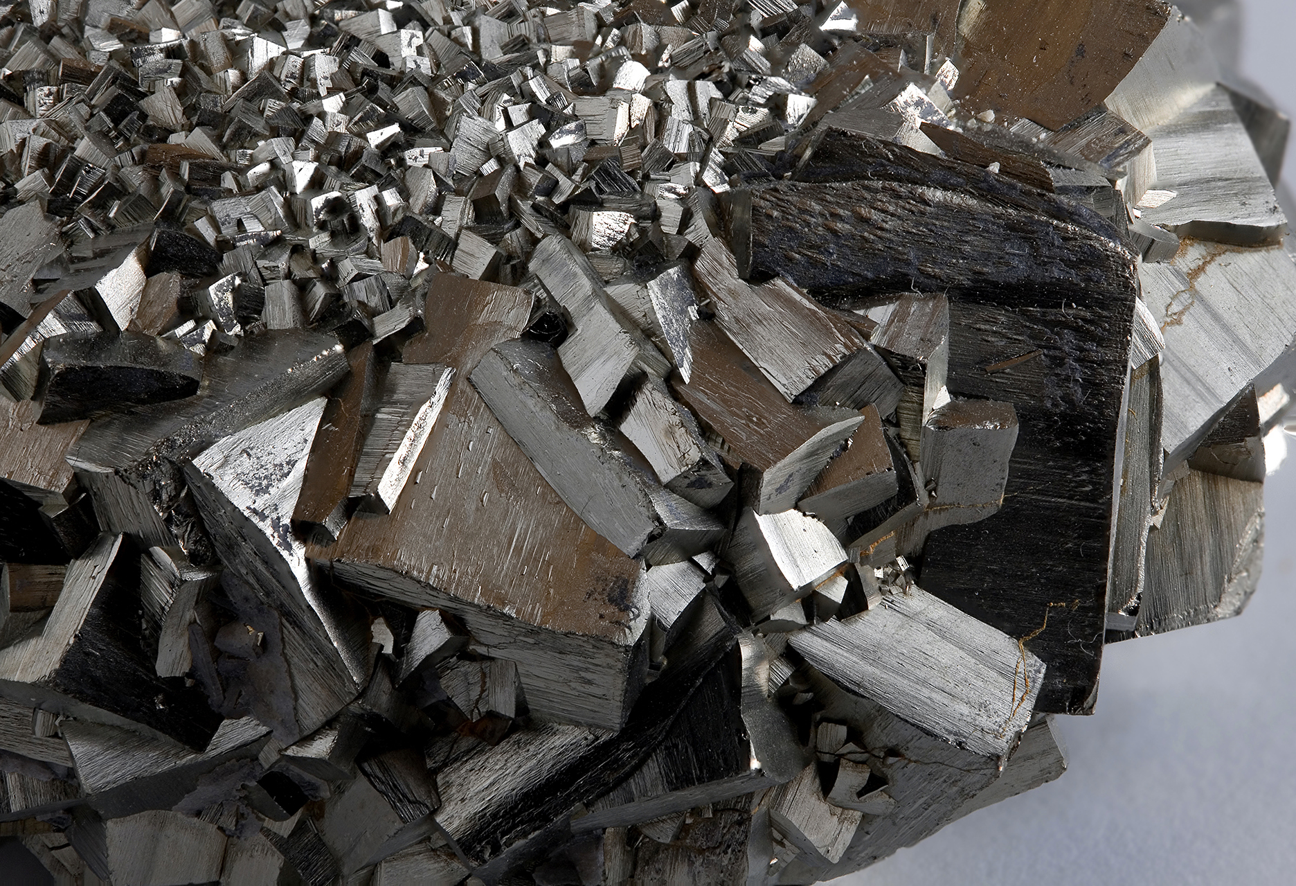 1.2 only